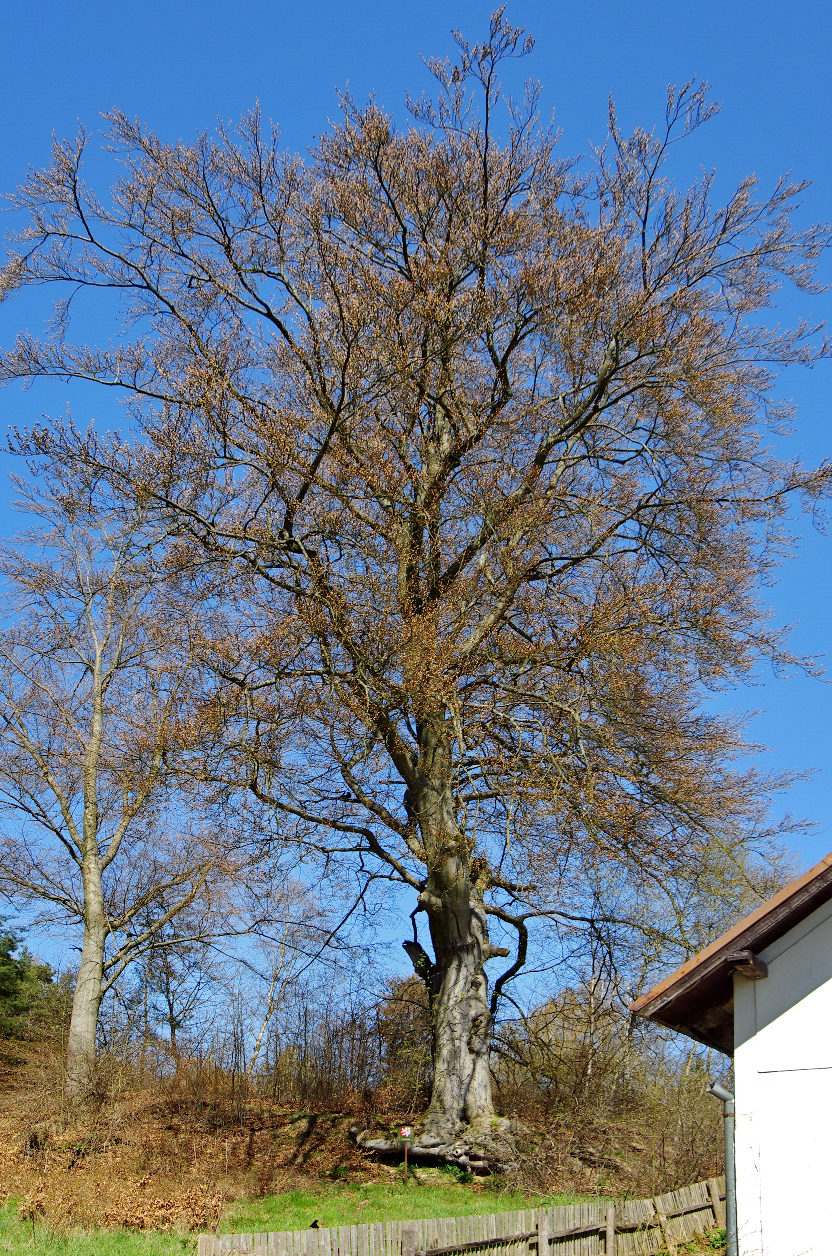 Památný strom Tatrovický buk, Tatrovice, okres Sokolov